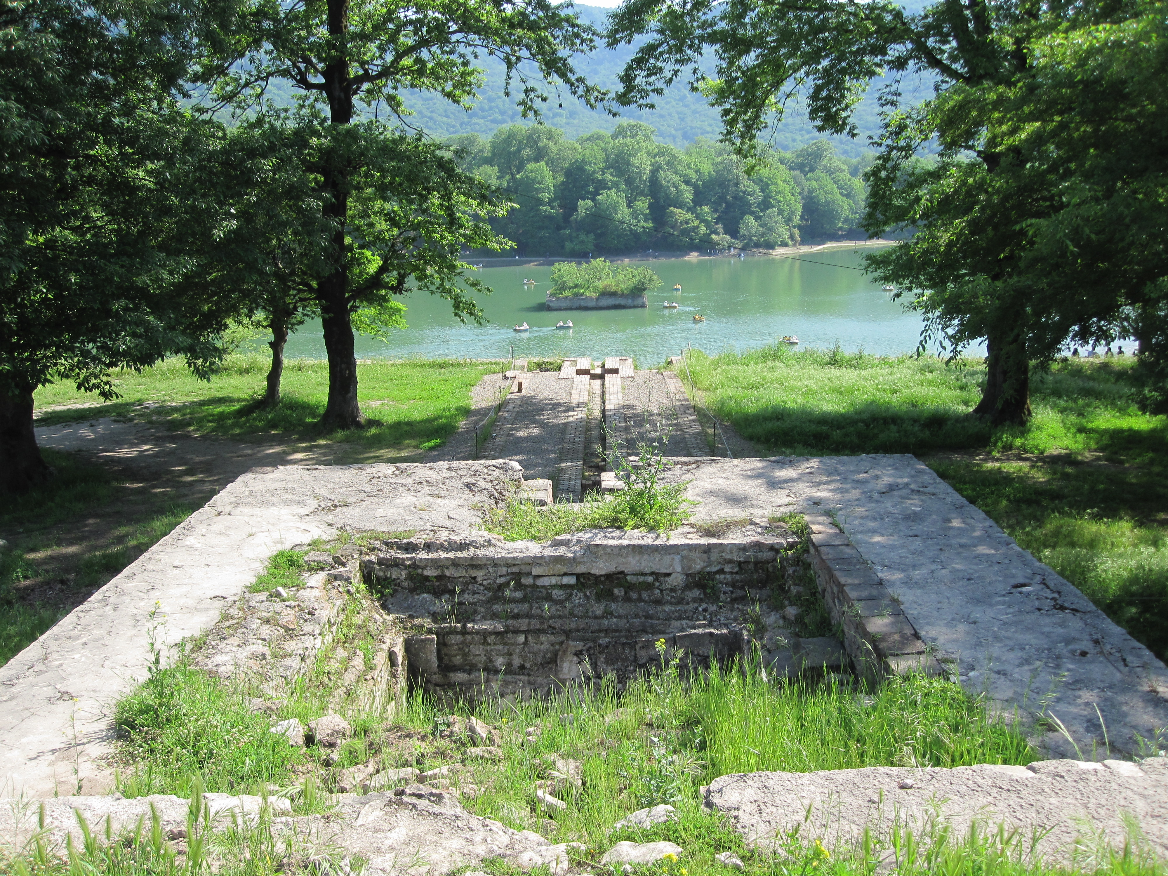 Abbasabad Garden